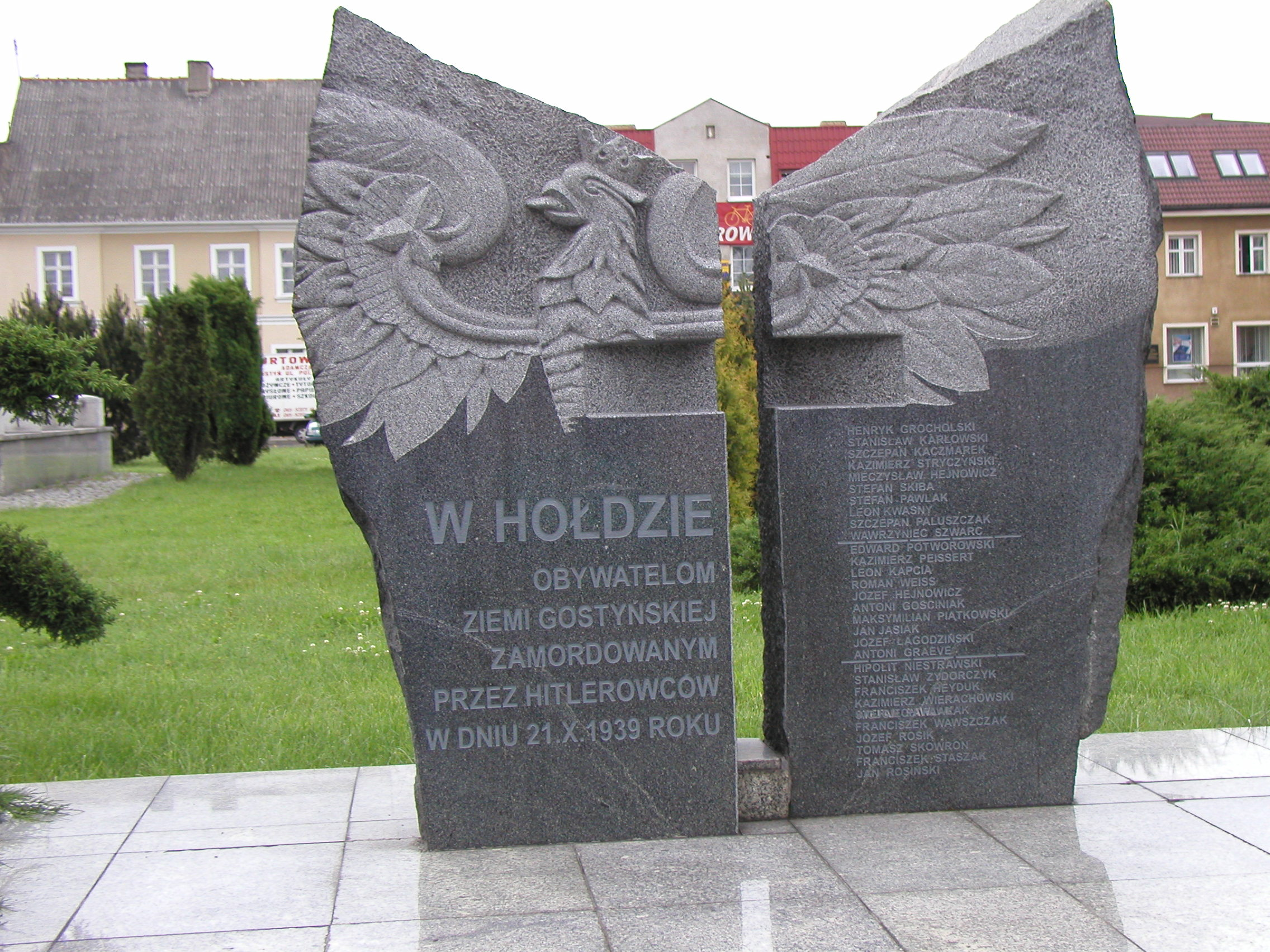 Memorial on town market Pomnik na rynku w Gostyniu (Polska). Data: 07 VI 2005 r. Autor: Barbara Wrzesińska